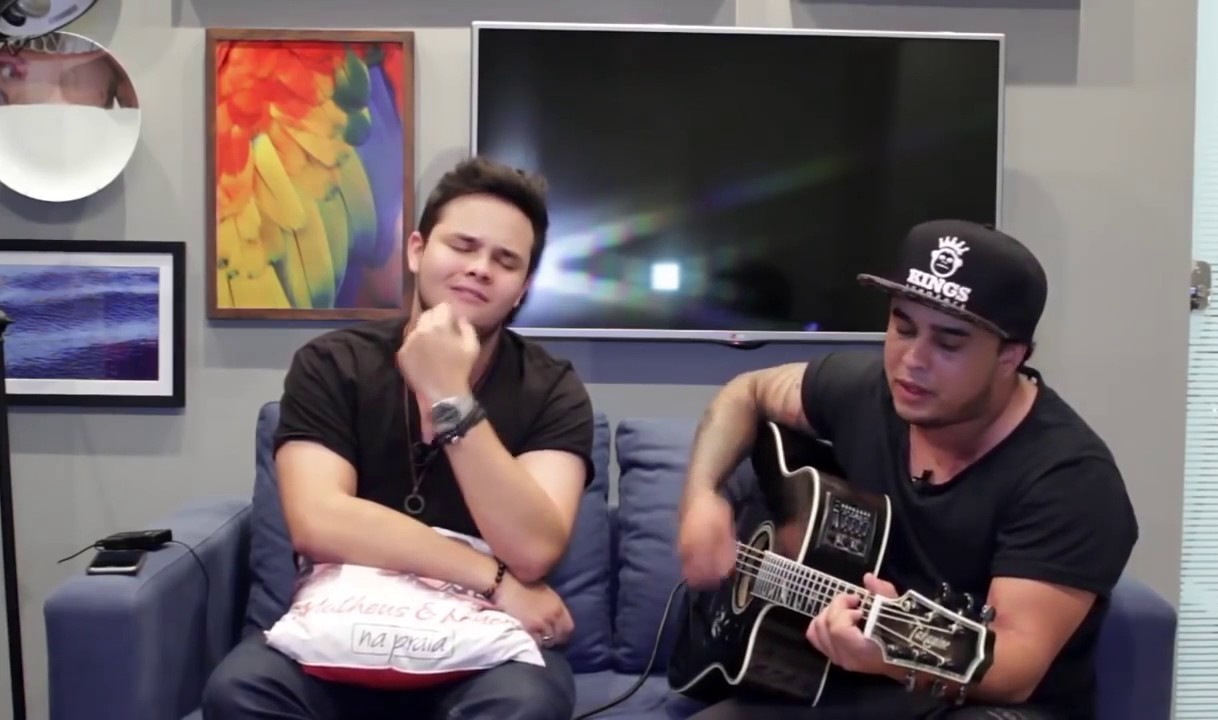 Dupla brasileira Matheus & Kauan